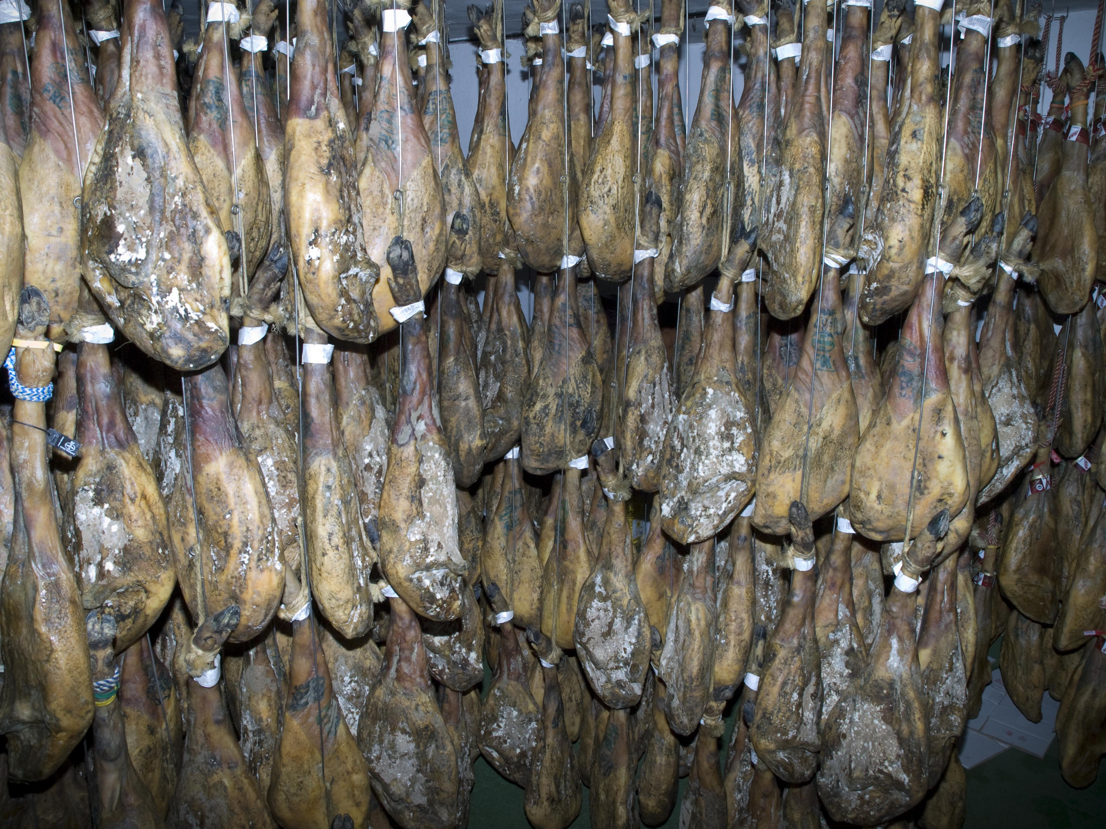 Secadero natural de la empresa Jamón Or, de los pocos naturales que quedan ya en Guijuelo, Salamanca.